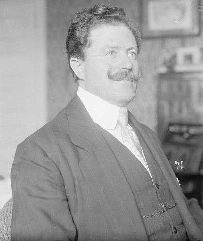 Nicola Zerola( 1876-1936), Italian tenor